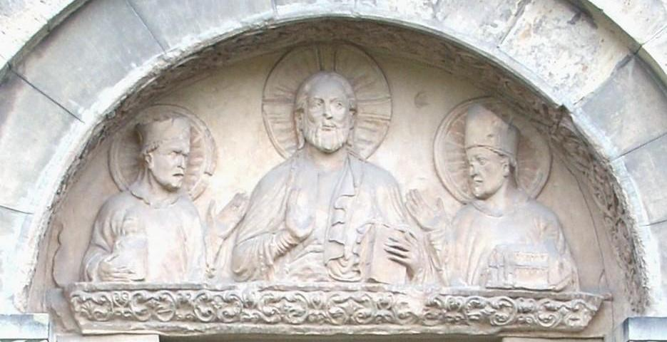 St. Godehard (Hildesheim), Tympanon am Hauptportal (Nordwestportal; es zeigt Cristus in der Mitte mit Epiphanius zur Rechten und Godehard zur Linken[1].